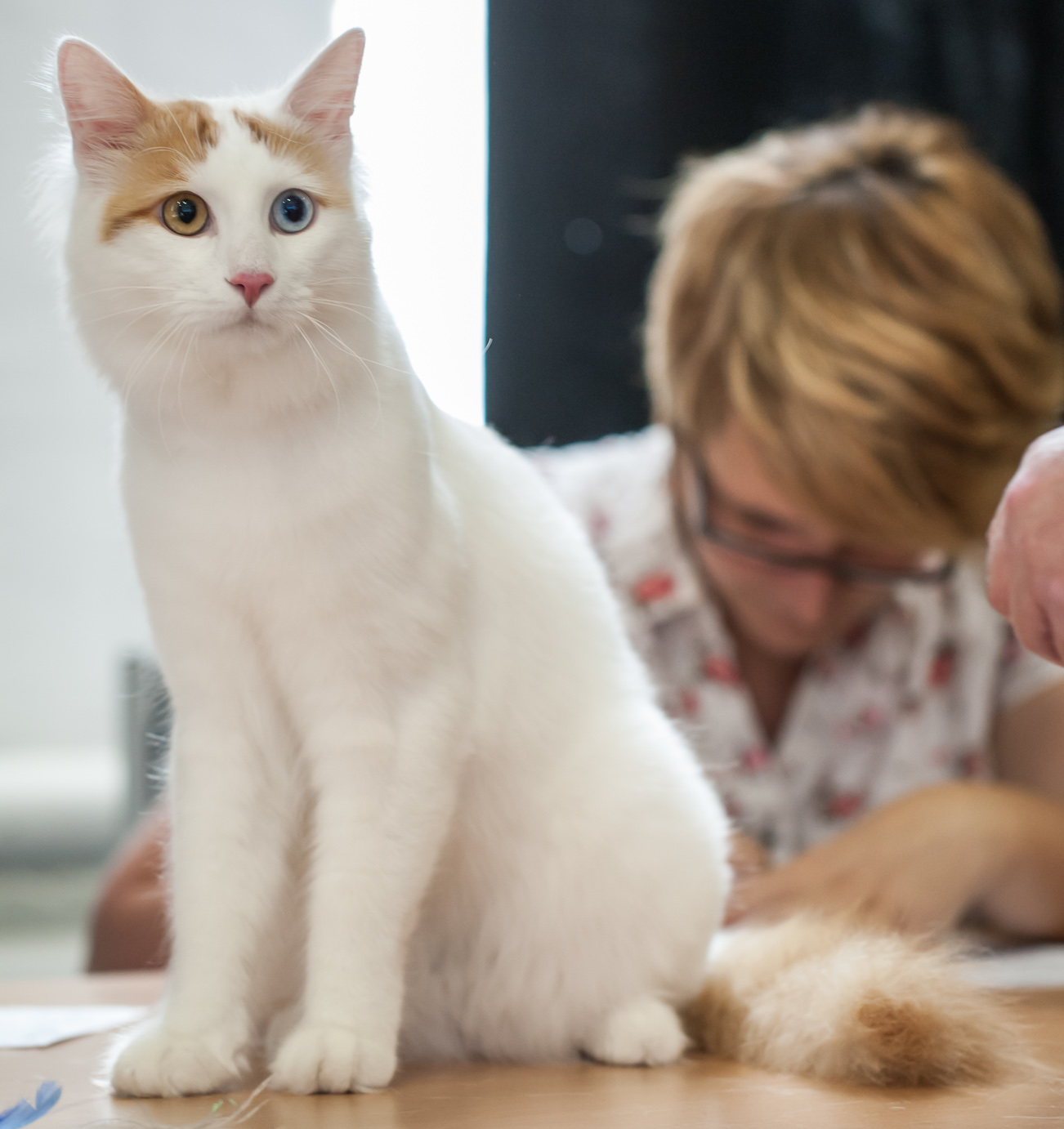 GizemliKediler Bey Bunyamin, mâle turc de Van roux présenté en exposition féline à Helsinki. Code EMS : GizemliKediler Bey Bunyamin (Beebe) [TUV d 63] male EX1 CAC